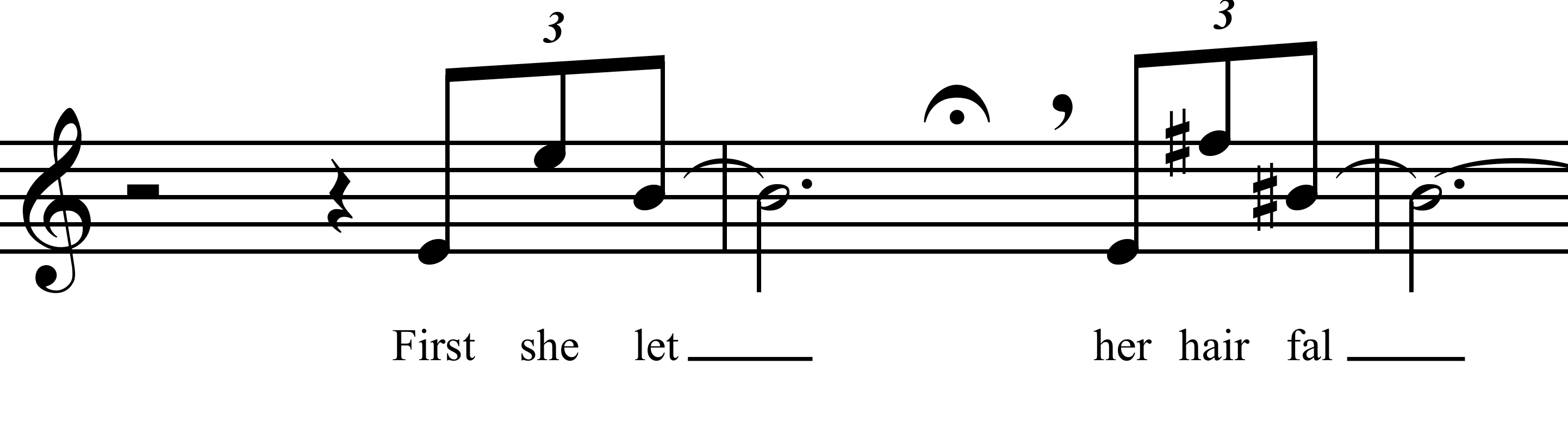 Extrait de la pièce XV d'Anna Livia Plurabelle d'André Hodeir